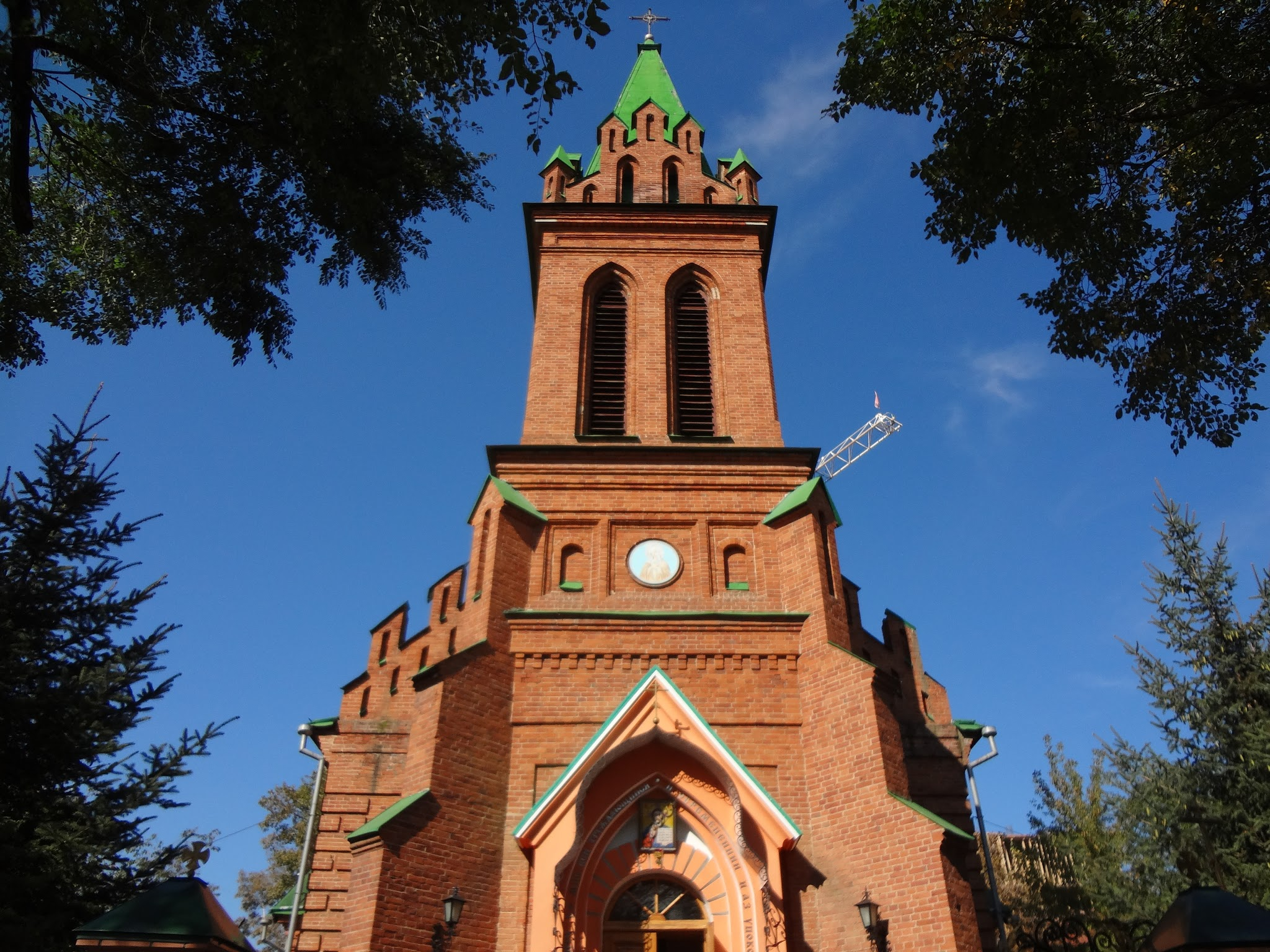 (Амурская область, Благовещенск, горького улица, 133)